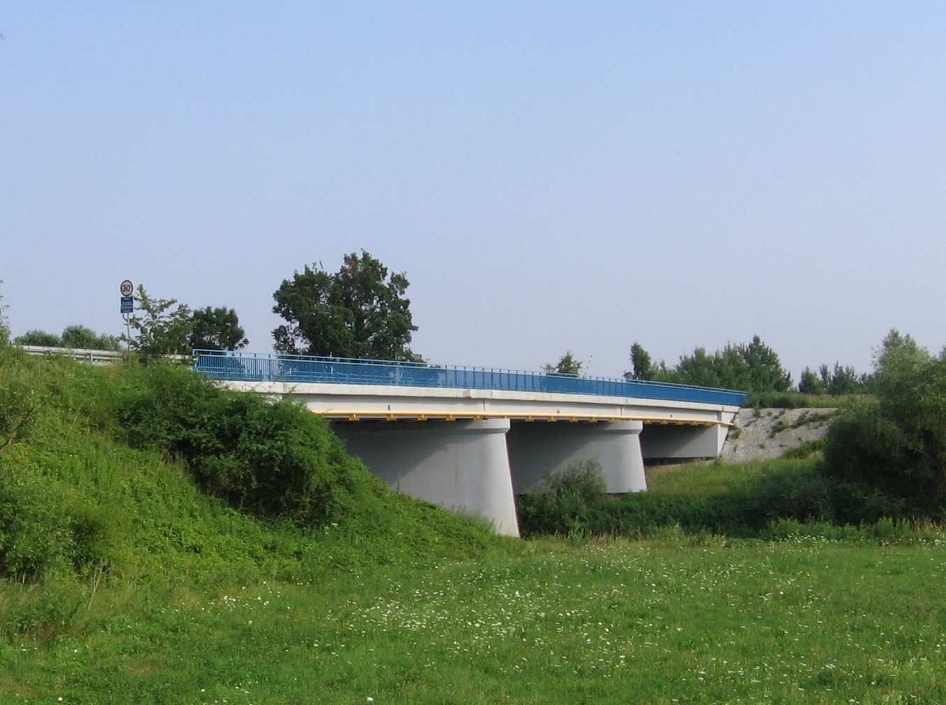 Brodzki bridge over Bystrzyca River, Wrocław, Poland